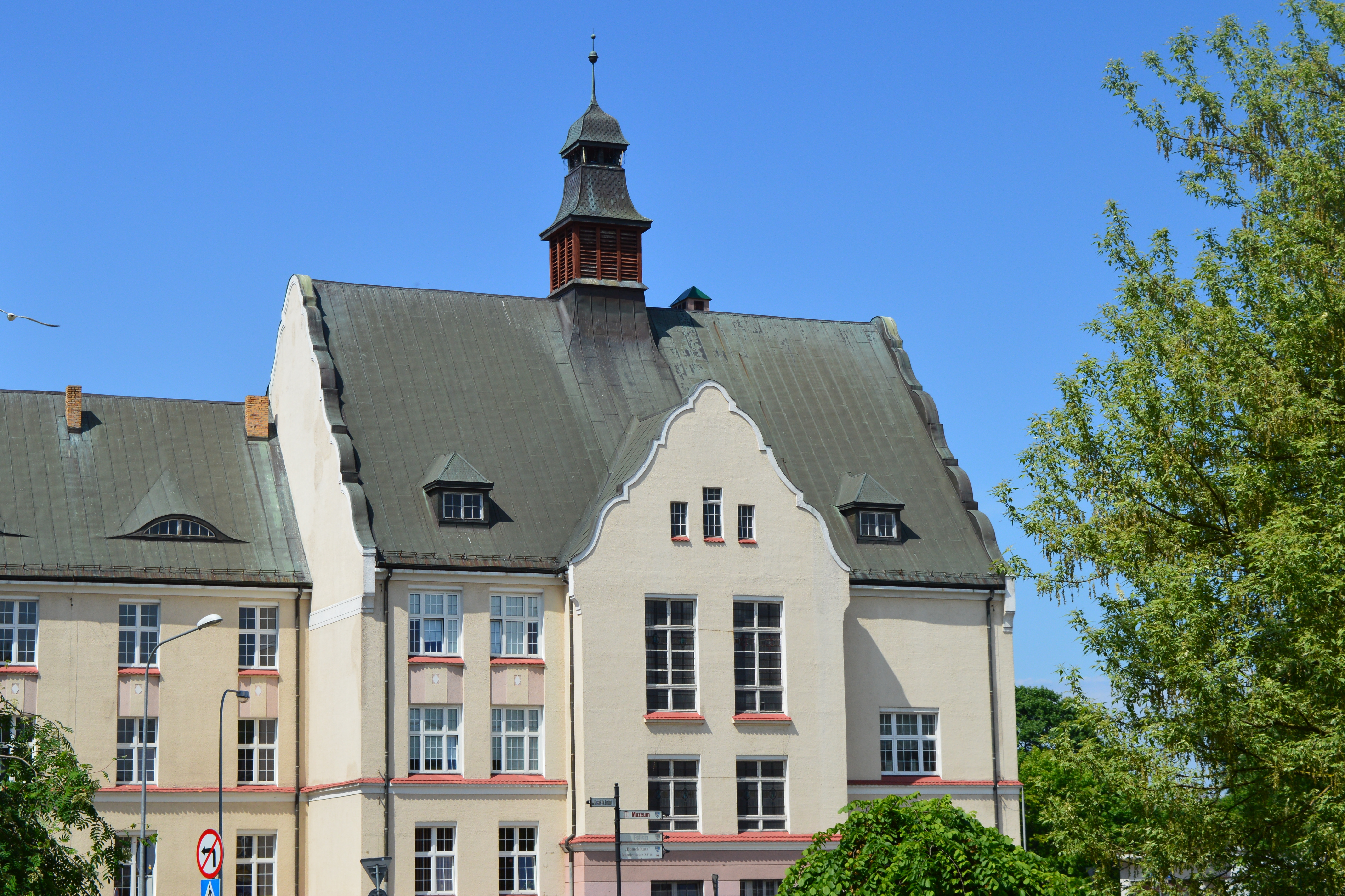 Gmach I Liceum Ogólnokształcącego w Koszalinie